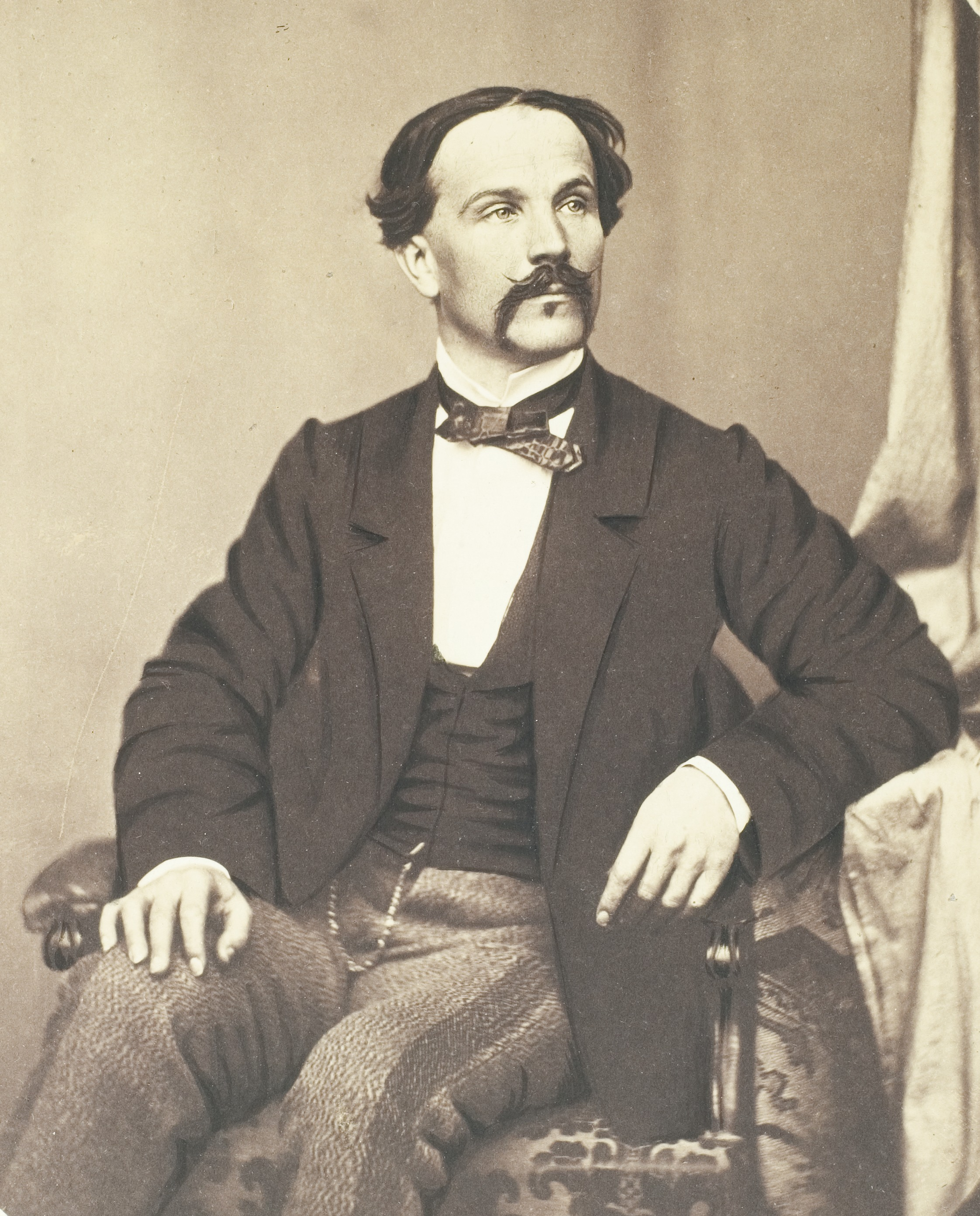 Achilles Renaud, Jurist, 1851–1884 Professor in Heidelberg